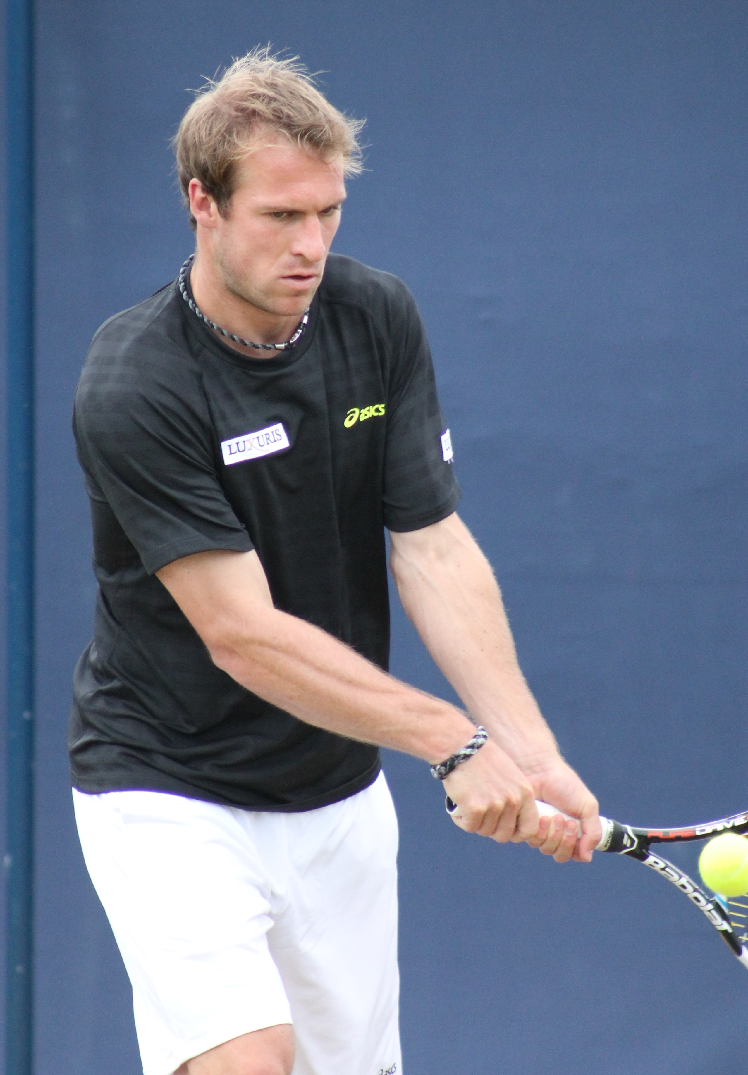 Zemlja QC13-001